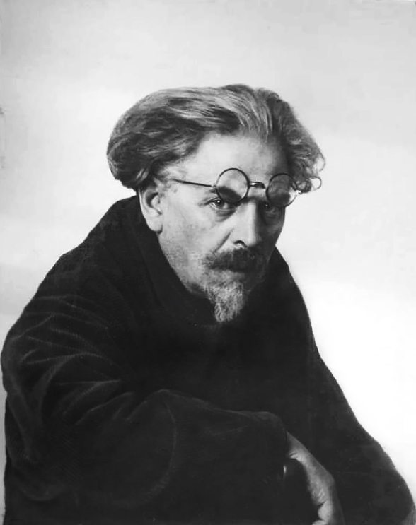 Поясной портрет в три четверти оборота.